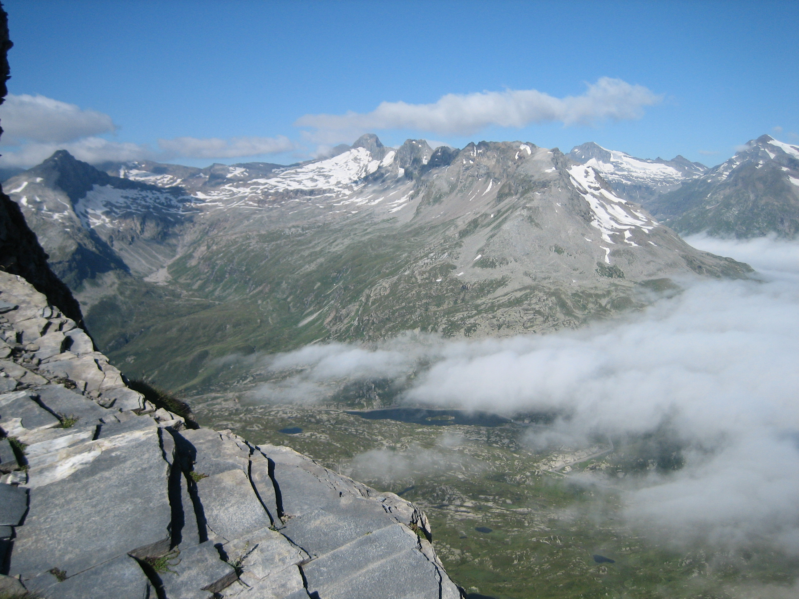 Passhöhe San Bernardino, Wettergrenze Süd-Nord